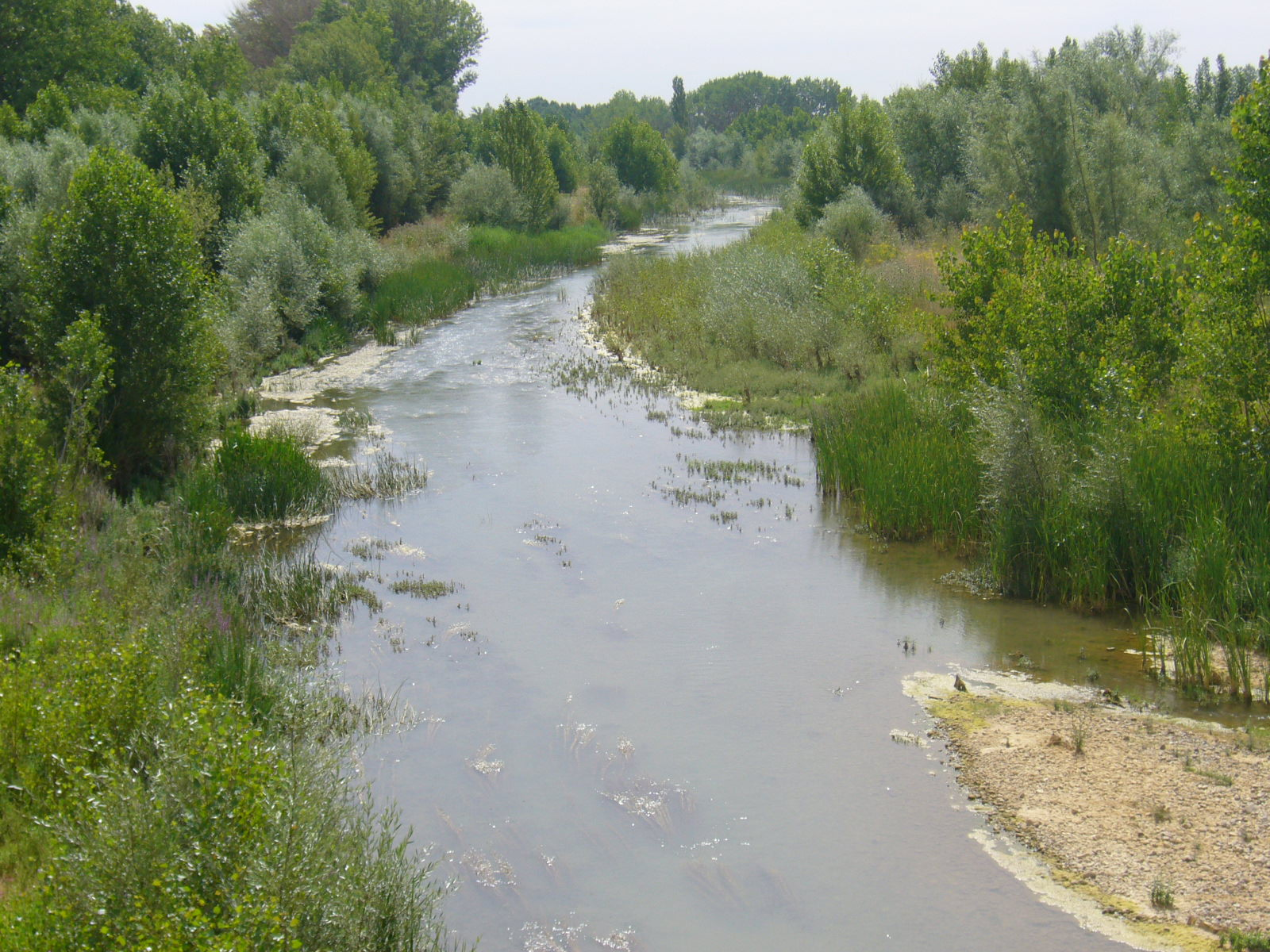 El río Valdavia a su paso por Osorno la Mayor, Palencia.